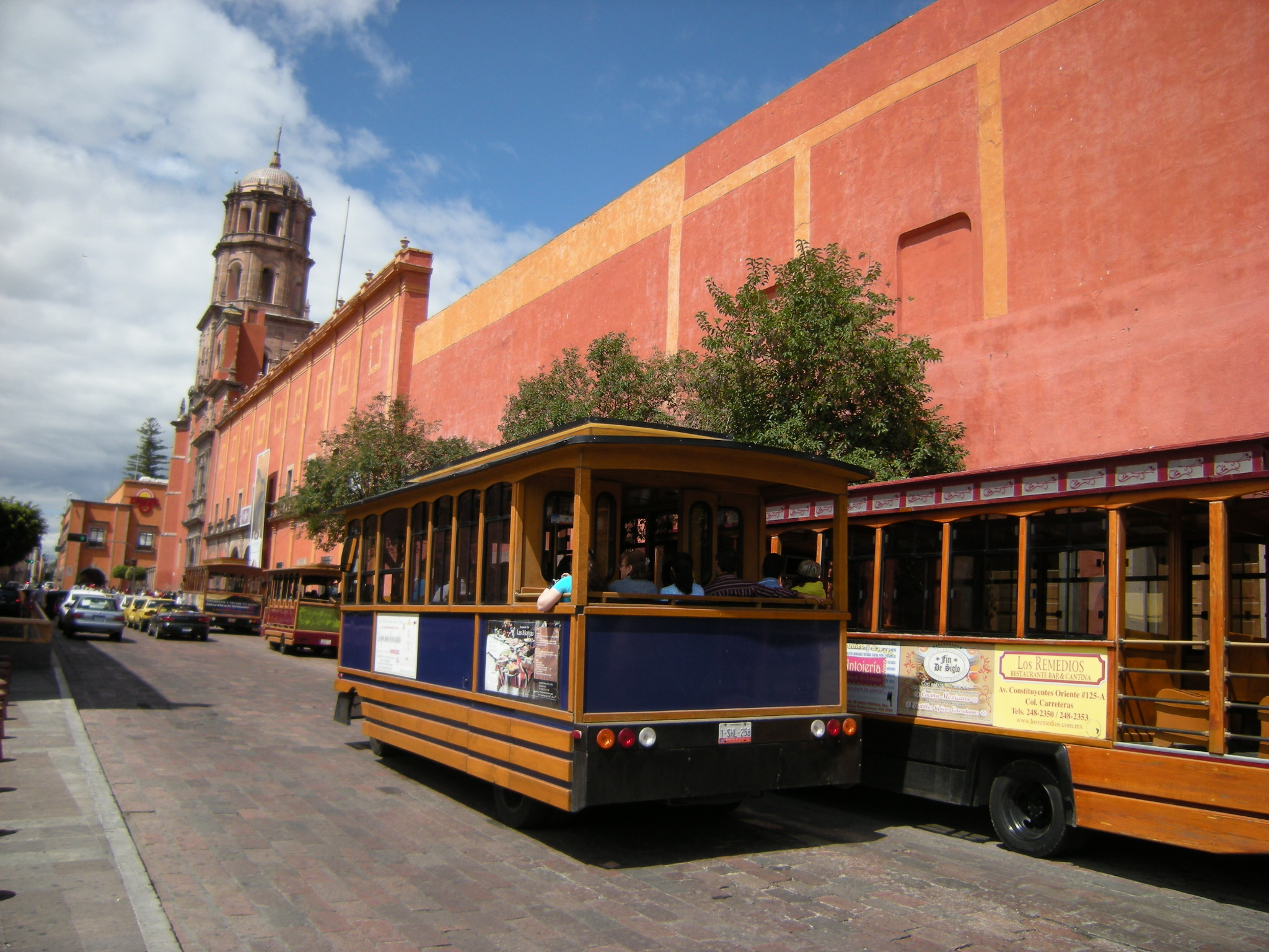 Santiago de Querétaro, México